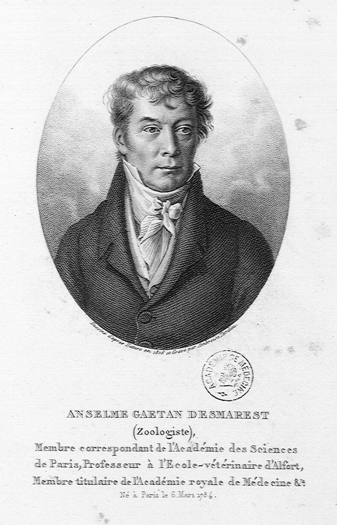 Portrait de Anselme Gaëtan Desmarest (1784-1838)